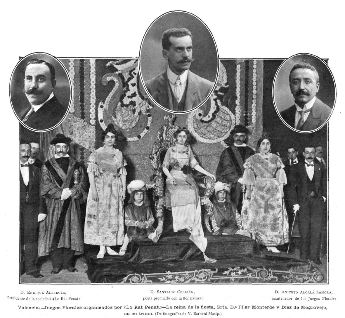 Valencia.—Juegos Florales organizados por «Lo Rat Penat»—La reina de la fiesta, Srta. D.ª Pila Monterde y Díez de Mogrovejo, en su trono, en la revista La Ilustración Artística.